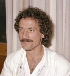 Julio Olaizola in 1981